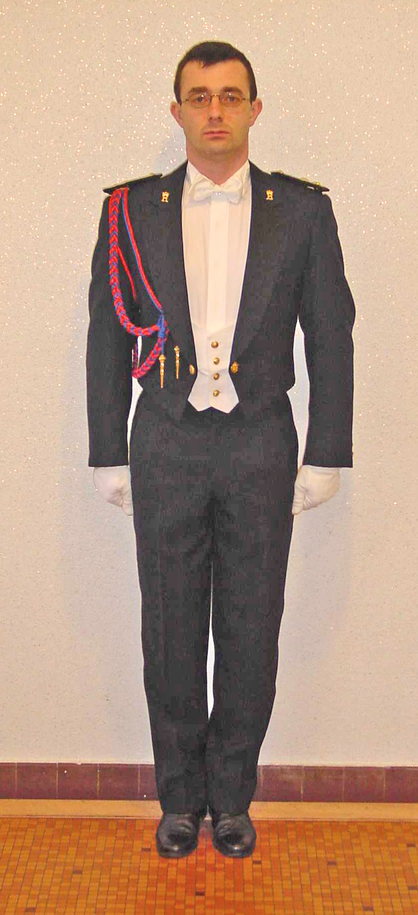 Lëtzebuerger Arméi Uniform Tenue G1bis